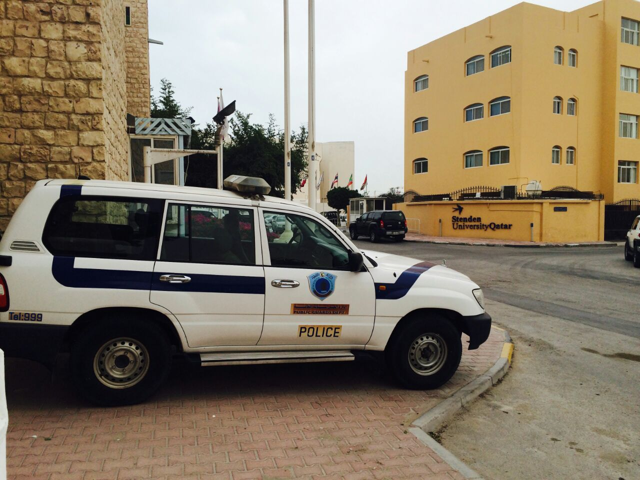 politieauto uit Qatar